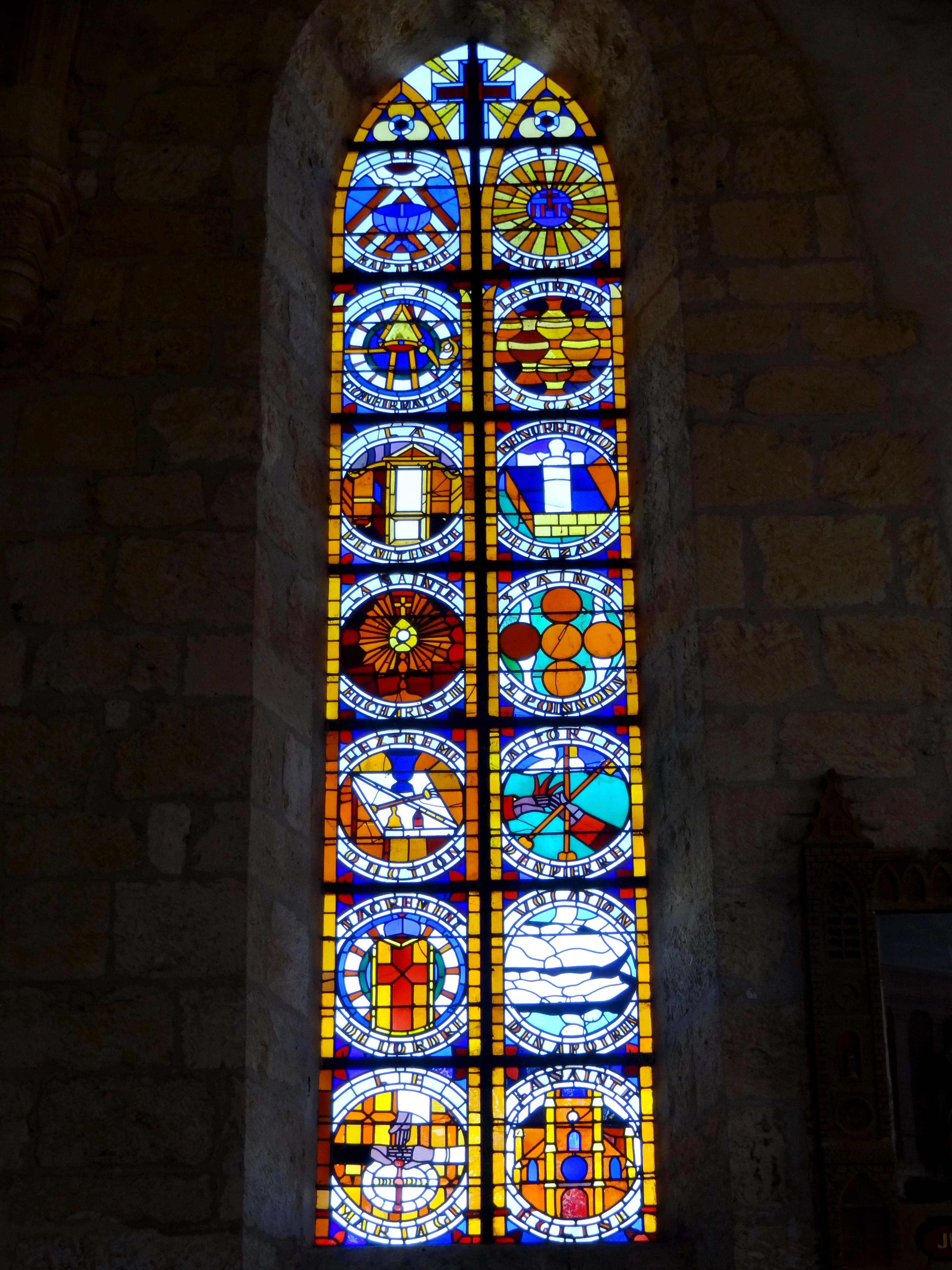 Vitraux de l'abbé Deligny - voir titre.